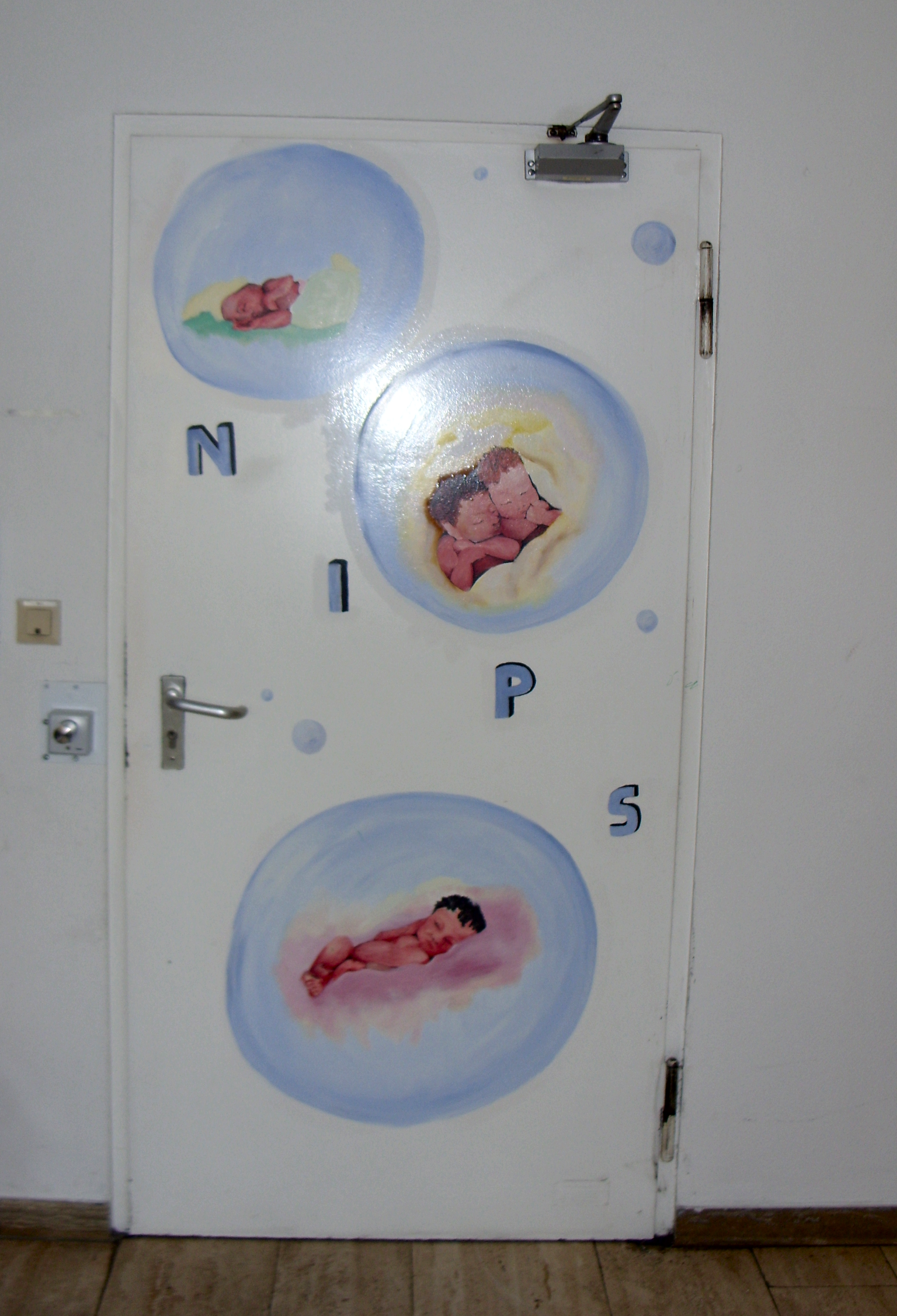 Eingang zur Neonatologische Intensivstation (NIPS) im Dr. von Haunerschen Kinderspital